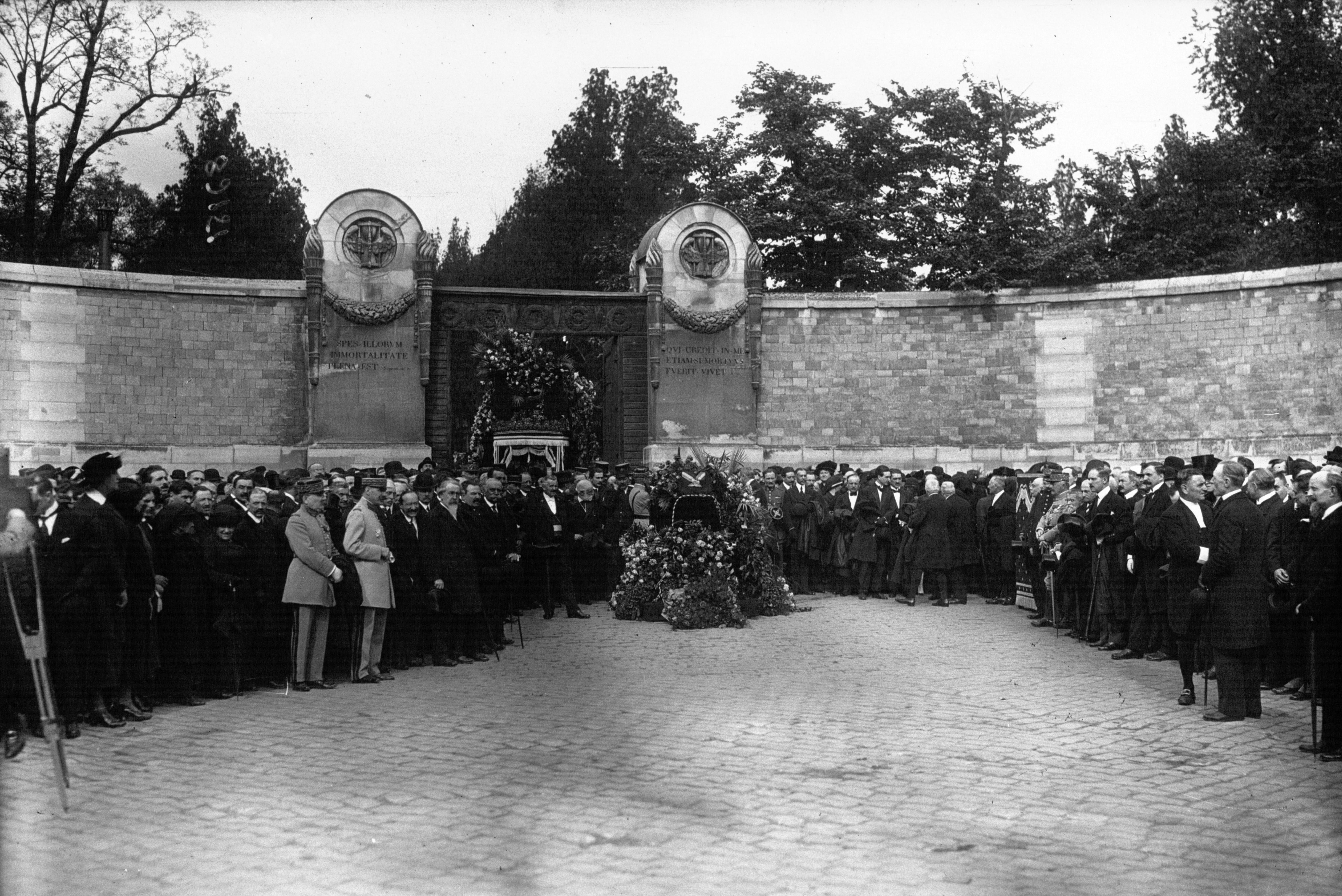 Les obsèques d'Eugène Etienne : vue générale au Cimetière du Père Lachaise